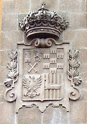 Escudo del ayuntamiento y concejo de Bimenes en el Principado de Asturias, España